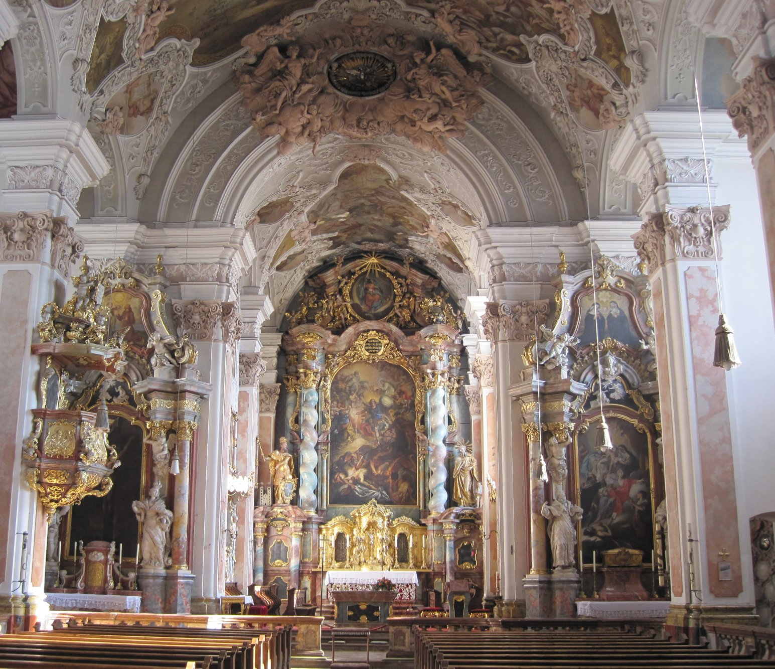 Benediktinerabtei Metten - Blick durch das Langhaus zum Chor